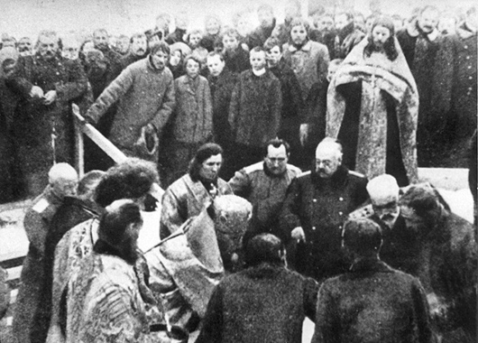 Fondation de Mourmansk et de l'église de Saint Nicolas de Myre